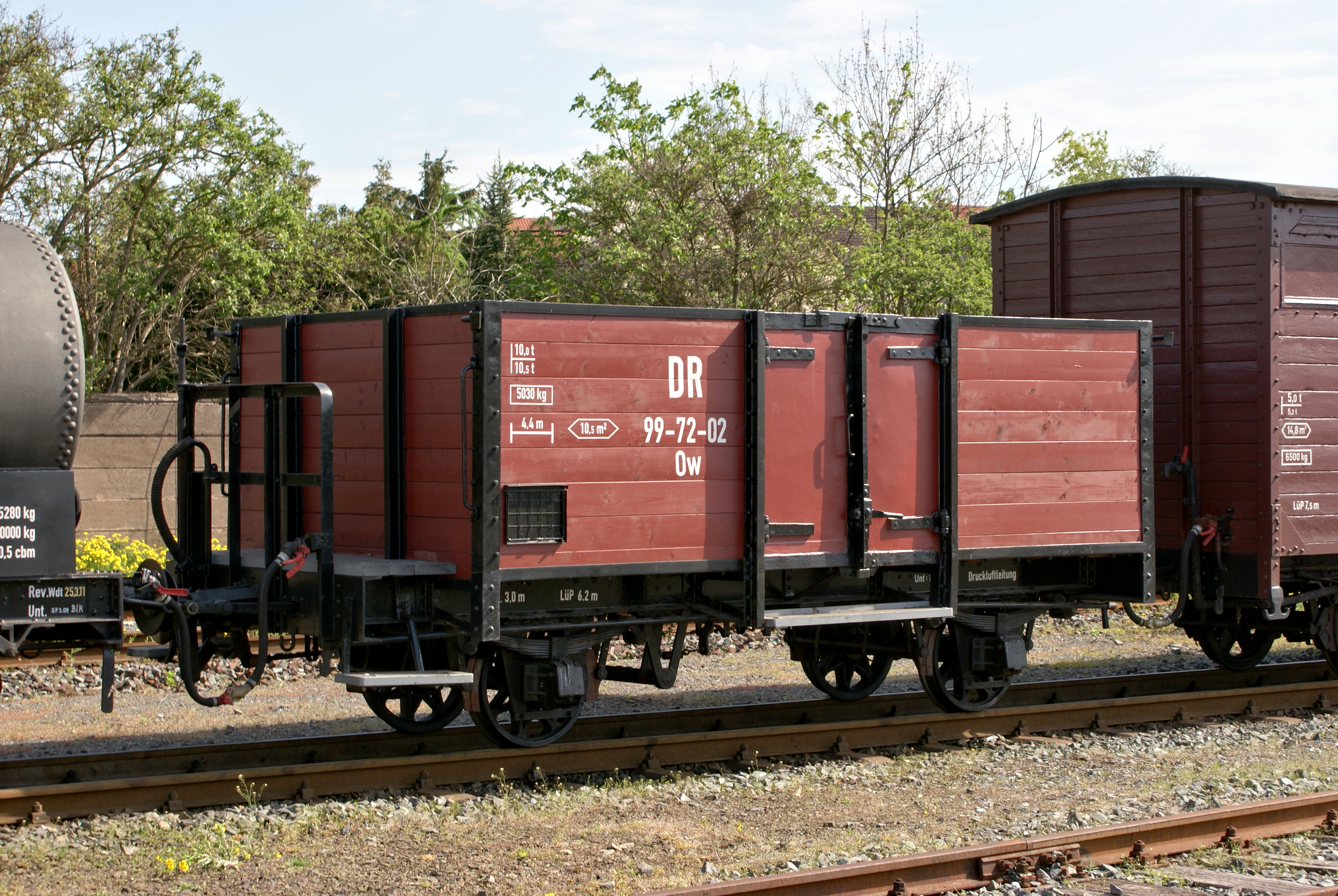 Offener Güterwagen 99-72-02 ex SHE 274 (O & K 1903) in Nordhausen-Nord 28.April 2012